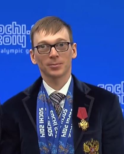 Двукратный паралимпийский чемпион и двукратный серебряный призёр Паралимпийских игр в биатлоне Николай Полухин.